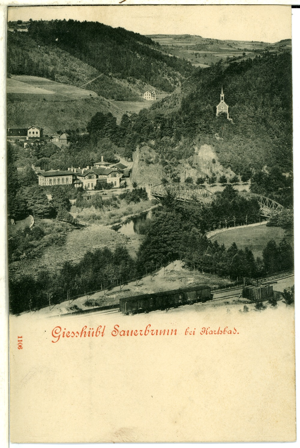 Gieshübel; Sauerbrunn - Blick in den Ort This postcard is from publisher Brück & Sohn in Meißen ( postcard has a unique number 01106 and is available in a higher resolution at the publisher. This images was uploaded in a cooperation project between Wikipedians and the publisher.